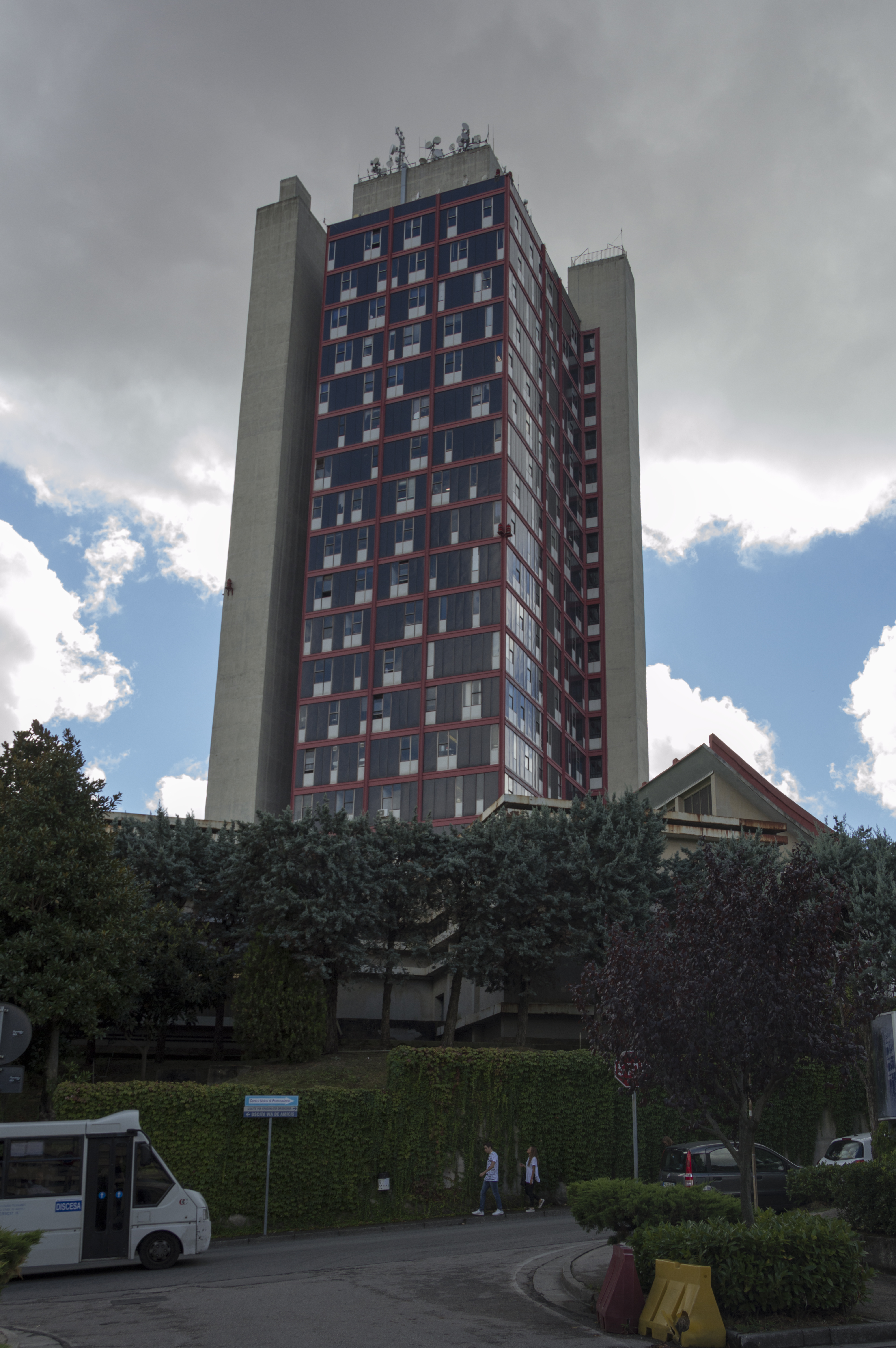 Torre del dipartimento di Biologia, II Policlinico.